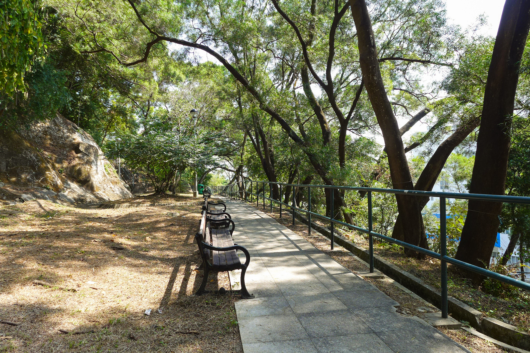 Lok Fu Park